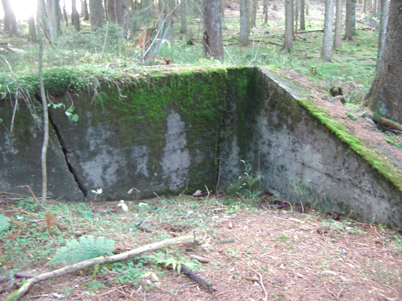 eine der am besten erhaltenen Grundmauern des Führer-Hauptquartiers in Tannenberg, Baden-Württemberg